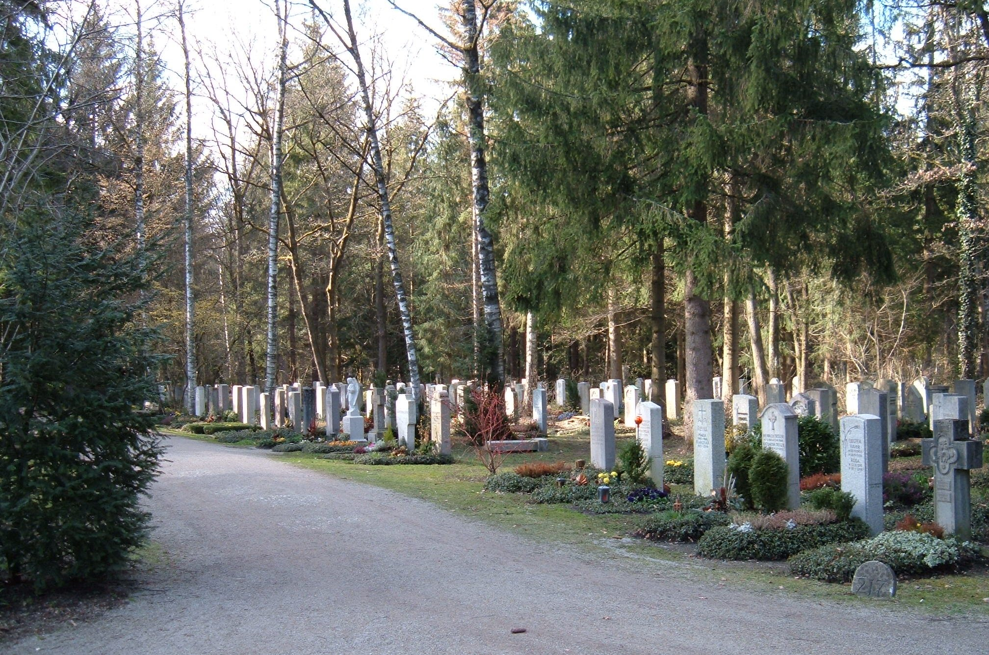 Waldfriedhof München